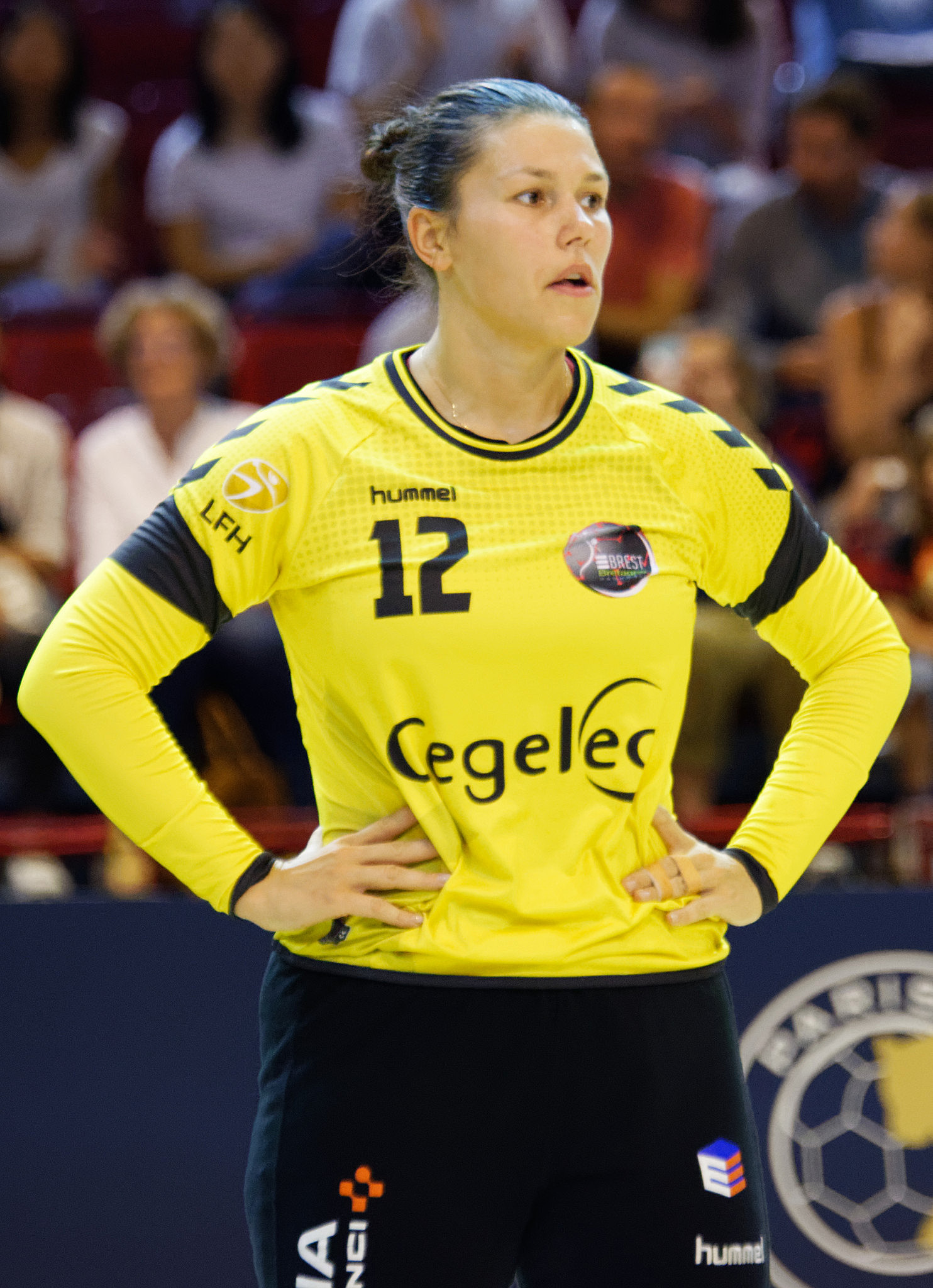 Rencontre de LFH entre Paris 92 et Brest Bretagne Handball. A la Halle Carpentier (Paris), le 05 septembre 2018.